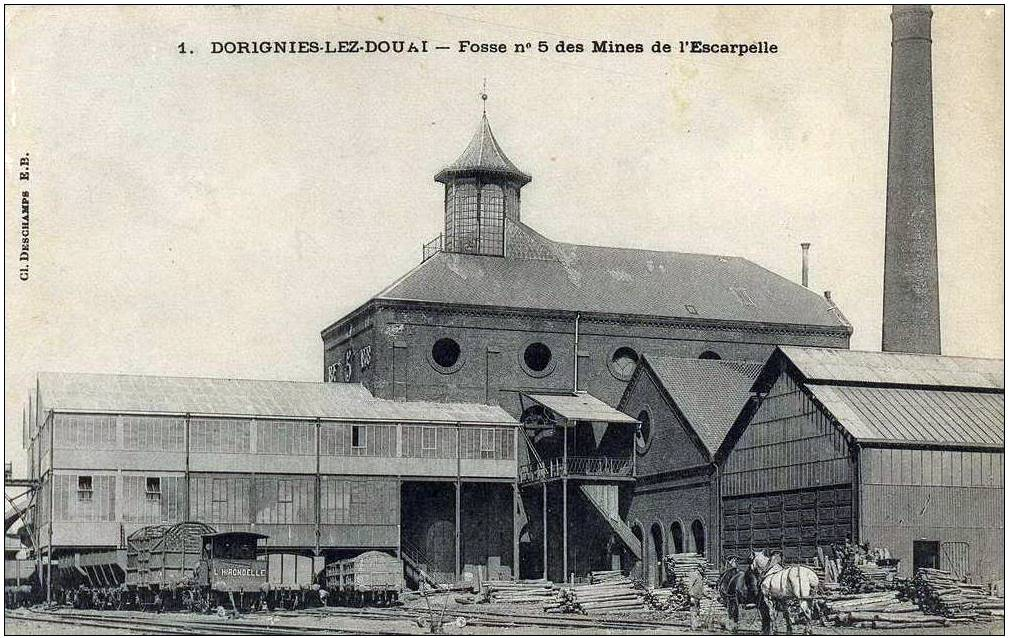 La Fosse n° 5 de la Compagnie des mines de l'Escarpelle était un charbonnage constitué d'un seul puits situé à Douai (Dorignies), Nord, Nord-Pas-de-Calais, France.